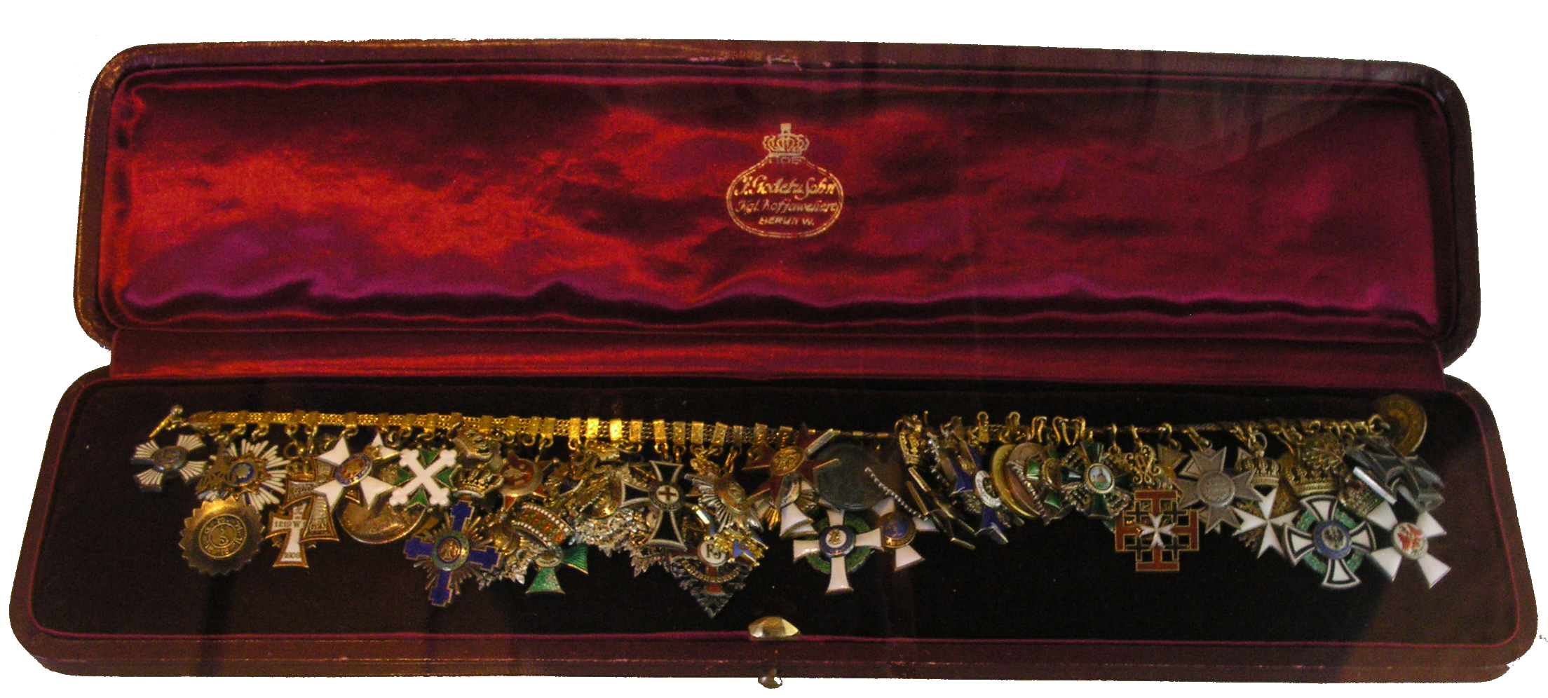 Frackkette in der Villa Hügel laut Beschreibung vermutlich von Gustav Krupp von Bohlen und Halbach. Hersteller: J. Godet & Sohn, Berlin um 1914